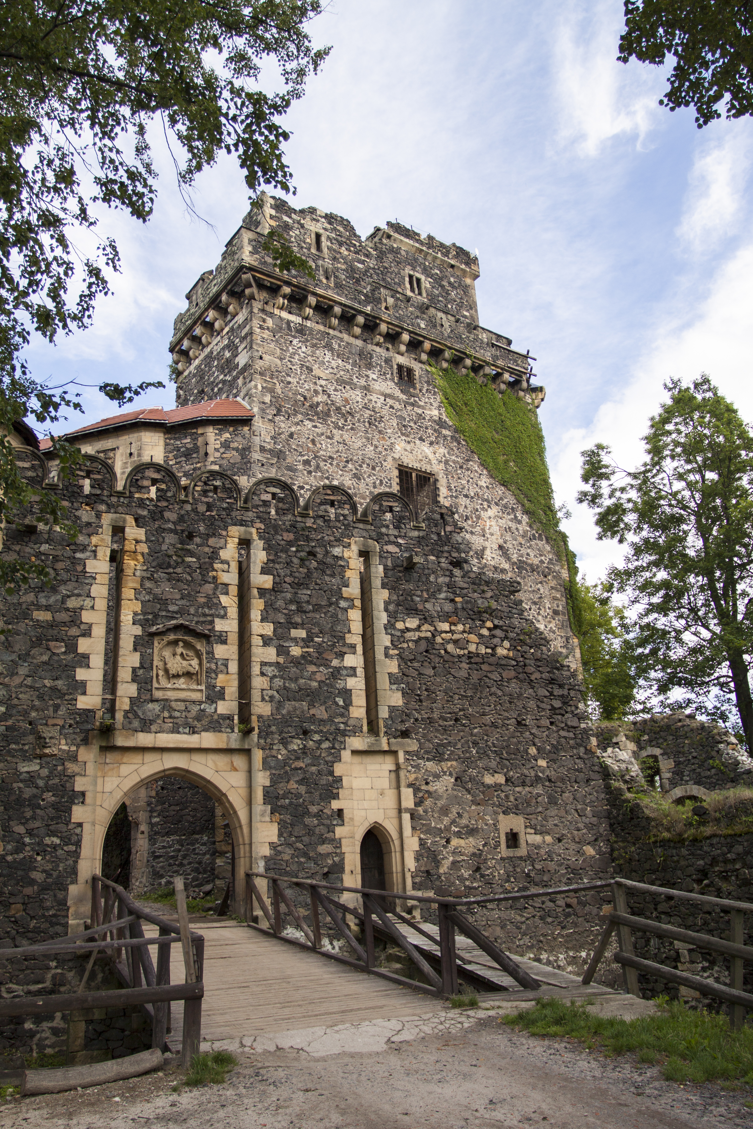 zespół zamkowy, XV-XX: - zamek Grodziec, gmina Zagrodno, powiat złotoryjski